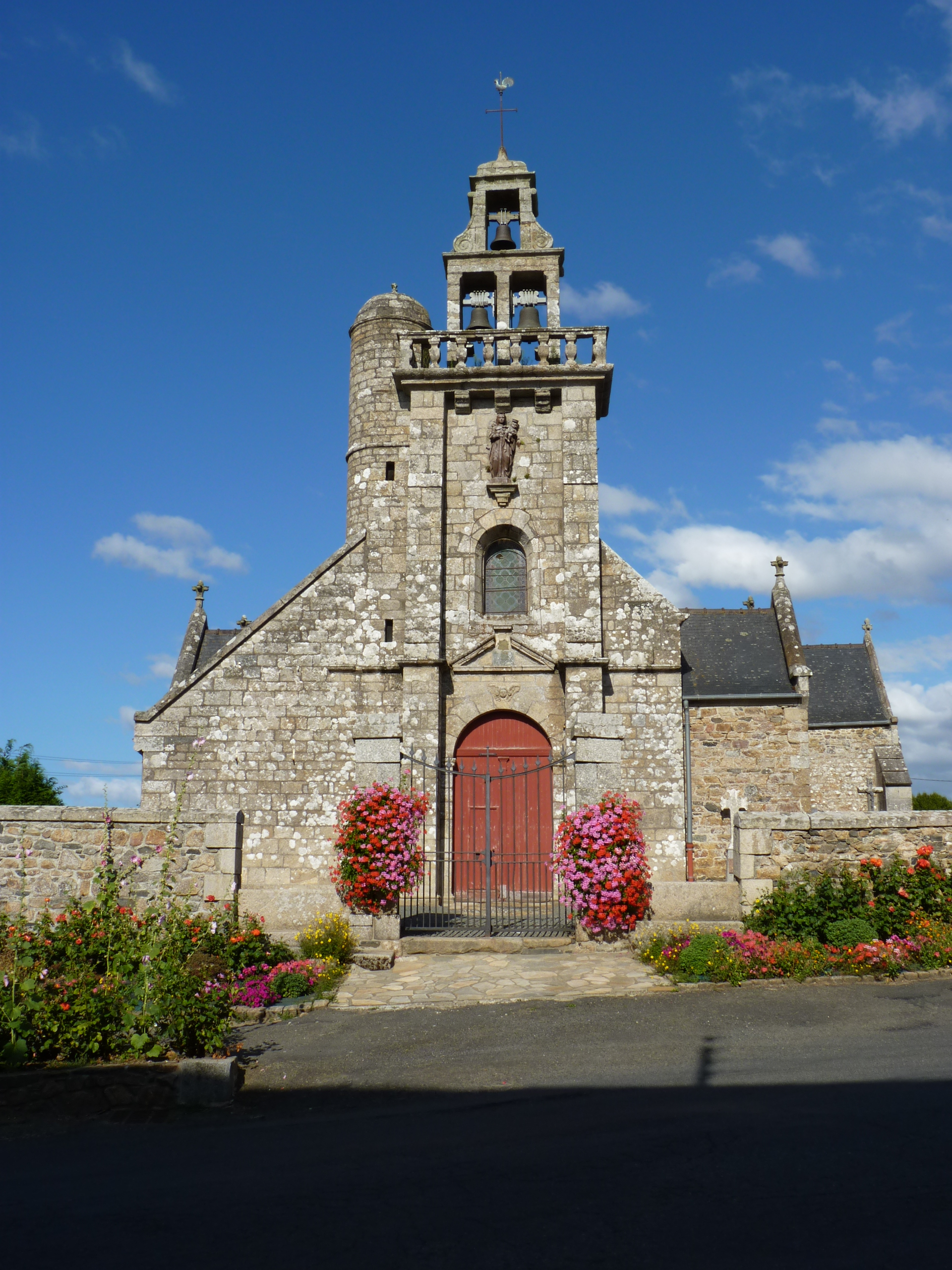 Église du 17ème siècle.